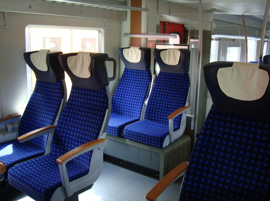 1.Klasse-Bereich in einem Triebwagen der Baureihe 440 der Deutschen Bahn, eingesetzt als "Fugger-Express" in der Region um Augsburg